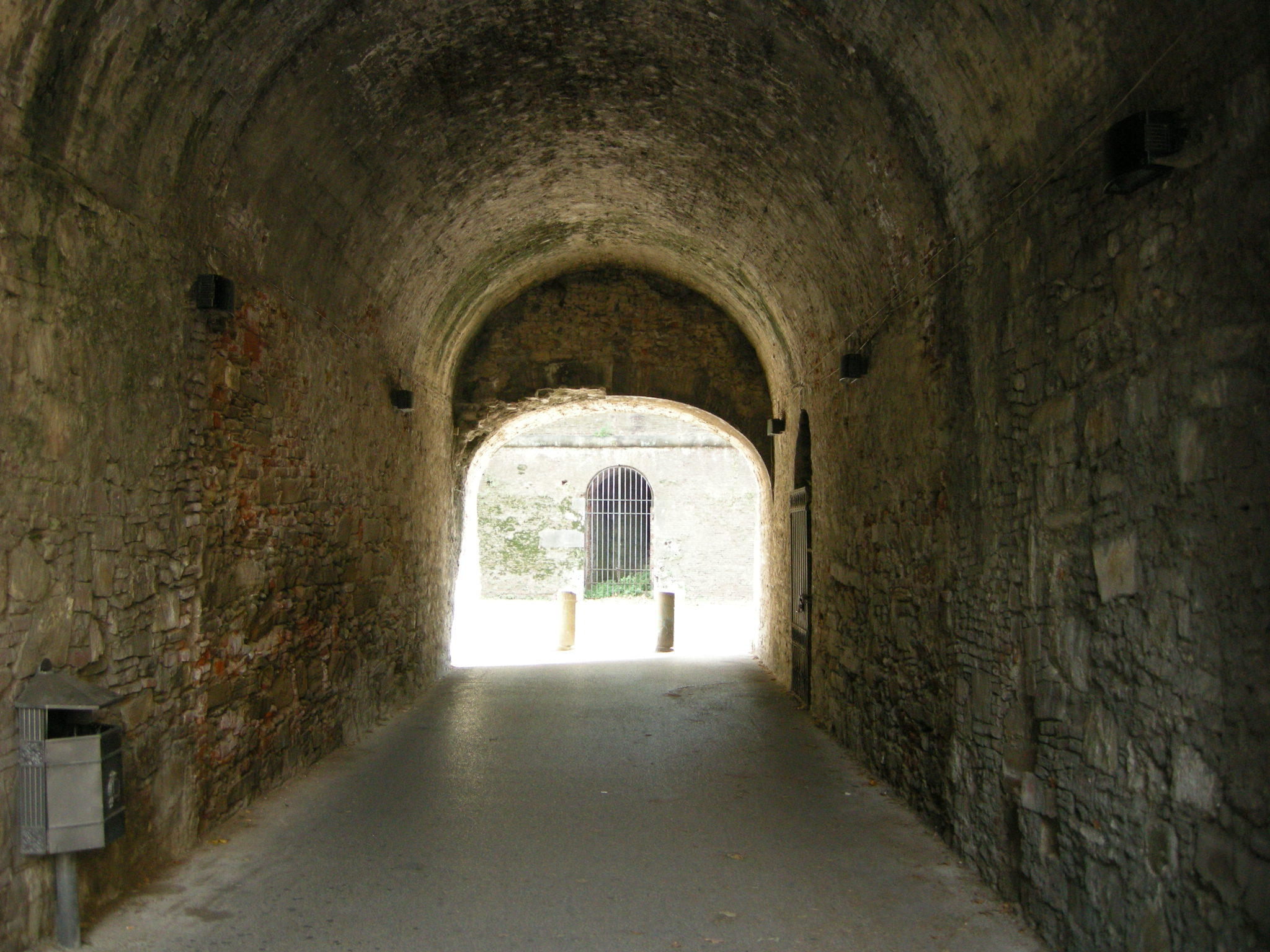 Lucca, mura, passaggio presso il baluardo di santa maria